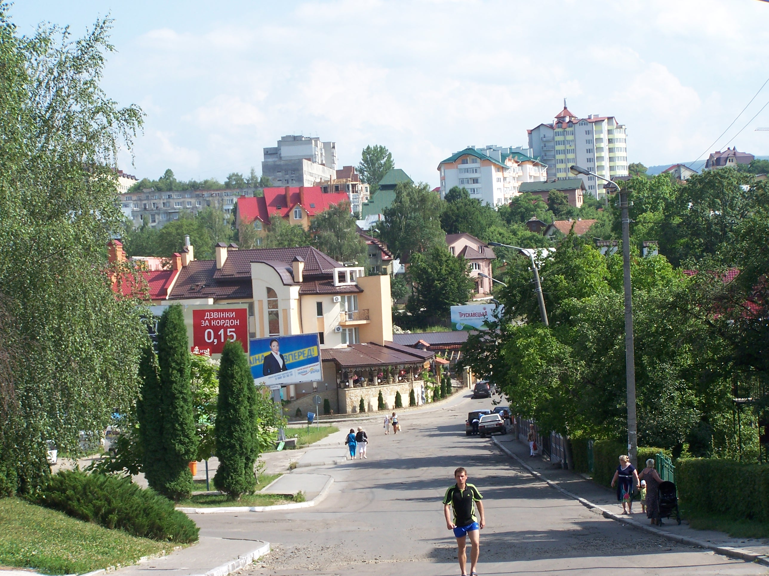 Truskavets, Lviv Oblast, Ukraine, 82200